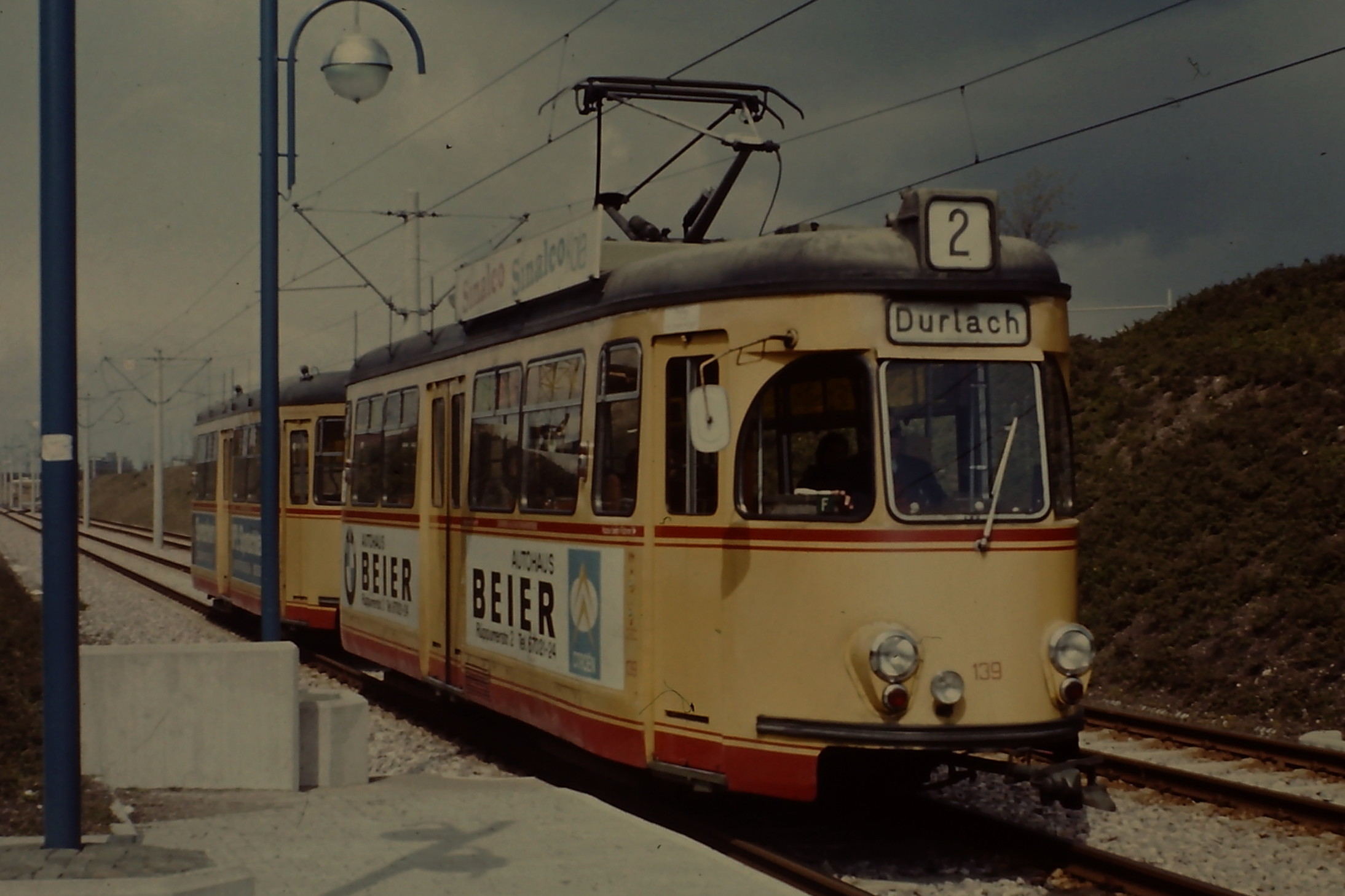 T4-EP Nr. 139 der Karlsruher Straßenbahn